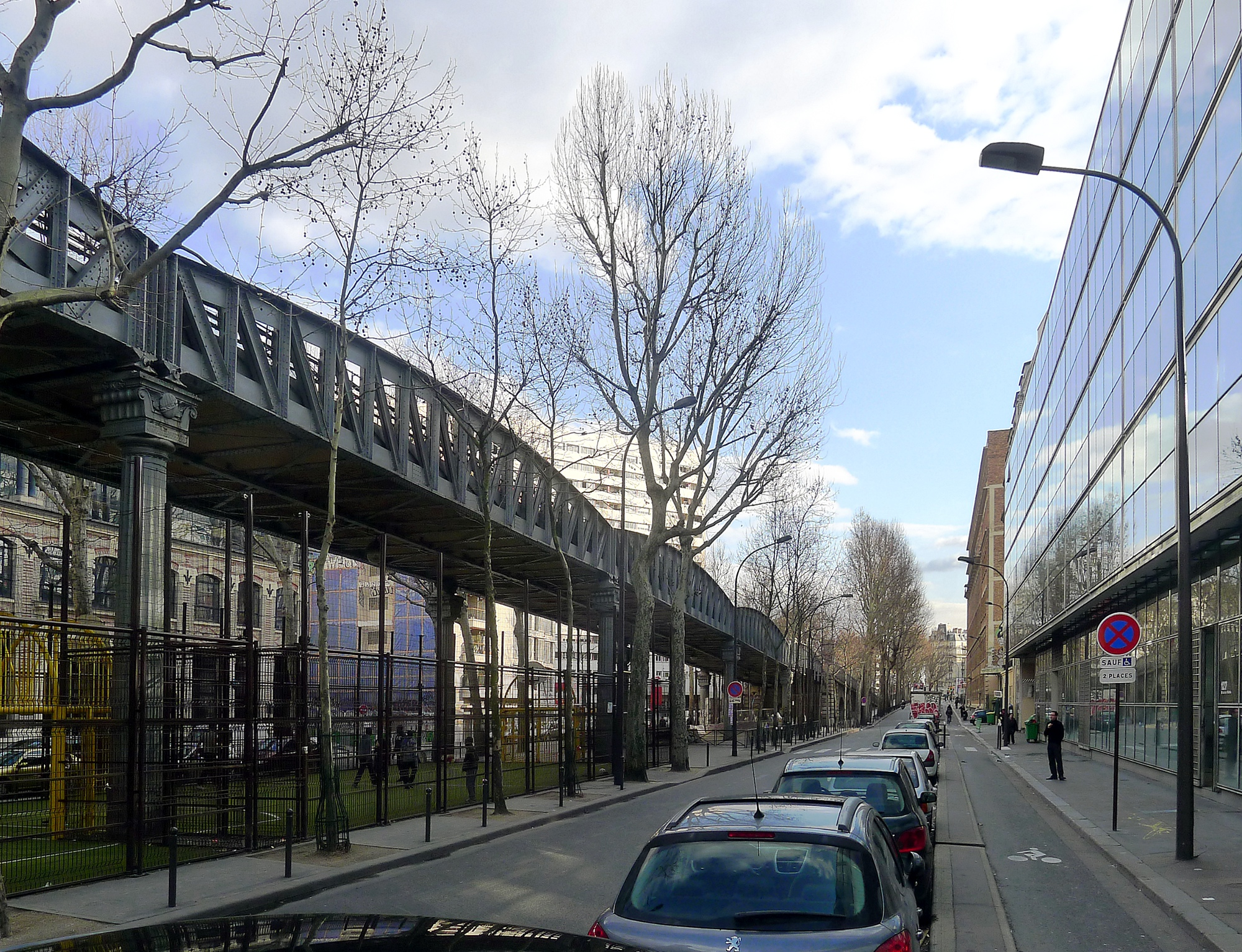 Boulevard de la Villette - Paris XIX